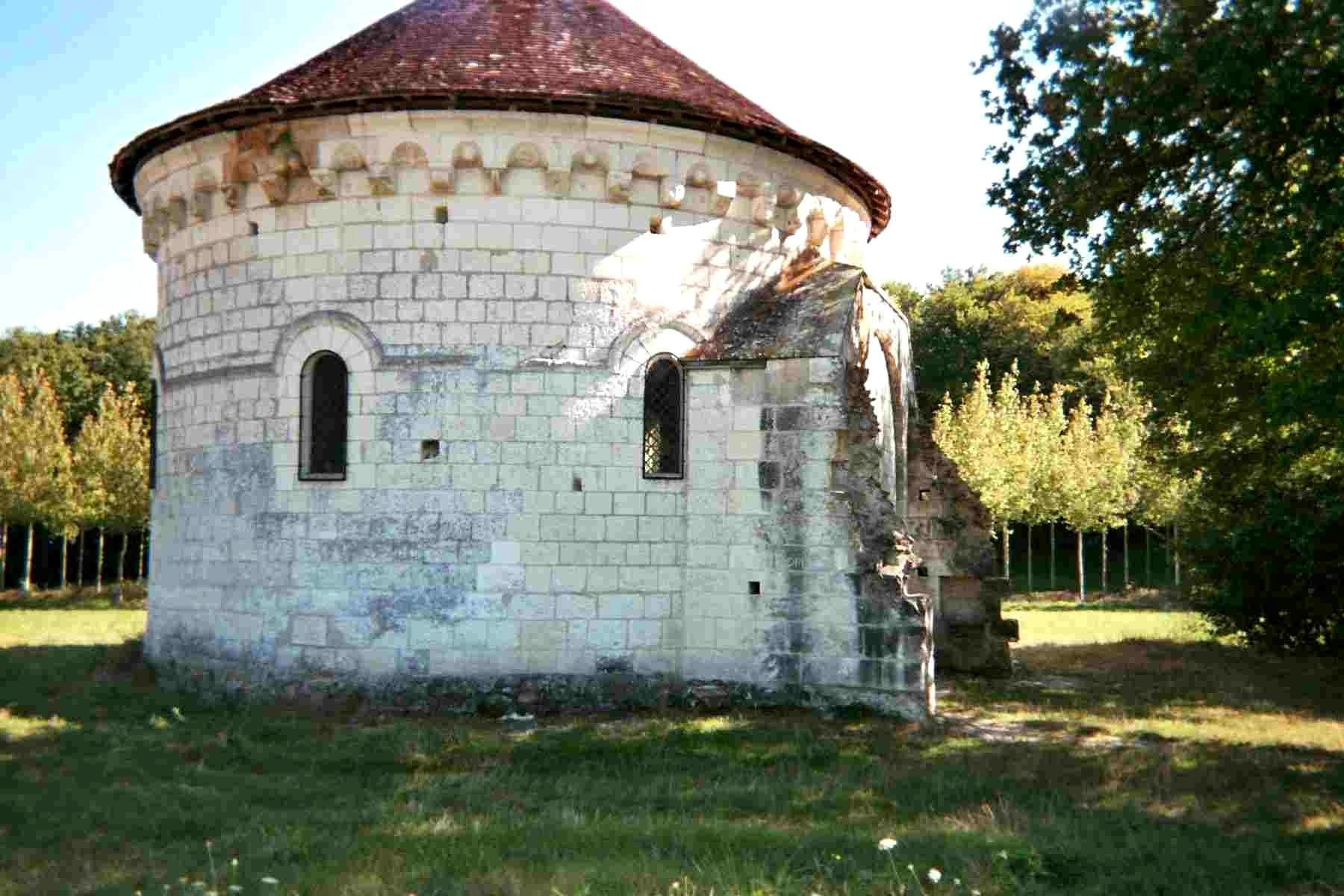 chapelle St Jean du Liget